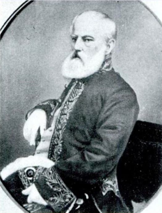 Antonio José de Irisarri Alonso (Guatemala; 7 de febrero de 1786 - Nueva York; 10 de junio de 1868) Militar guatemalteco/chileno que destacó en la independencia de Chile.